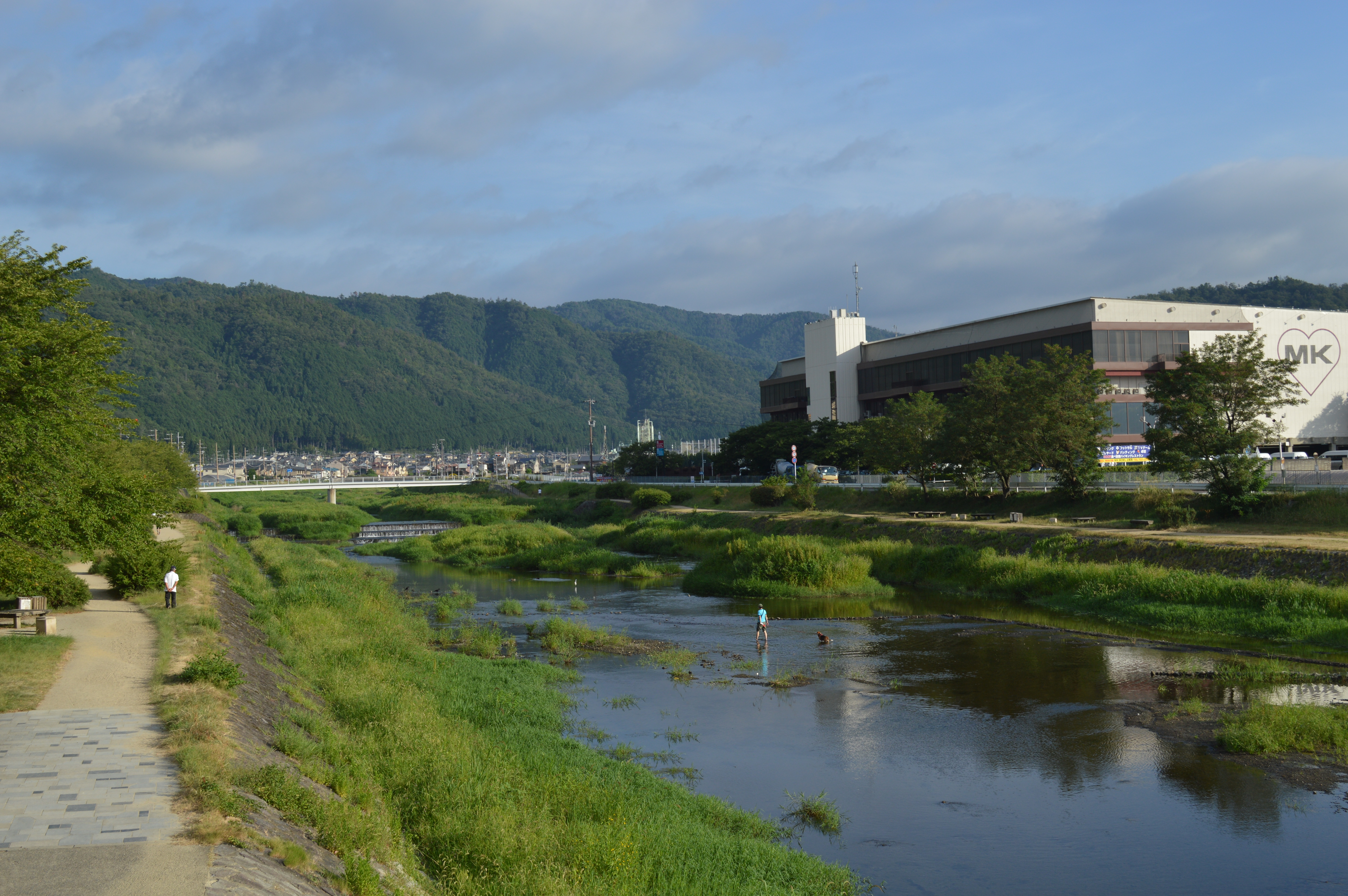 京都北山と鴨川、西加茂橋から